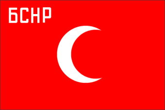 Флаг Бухарского Эмирата (условно с 1919 по 20 сентября 1920 года)